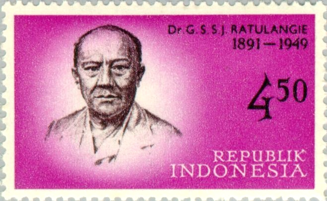 Sam Ratulangi